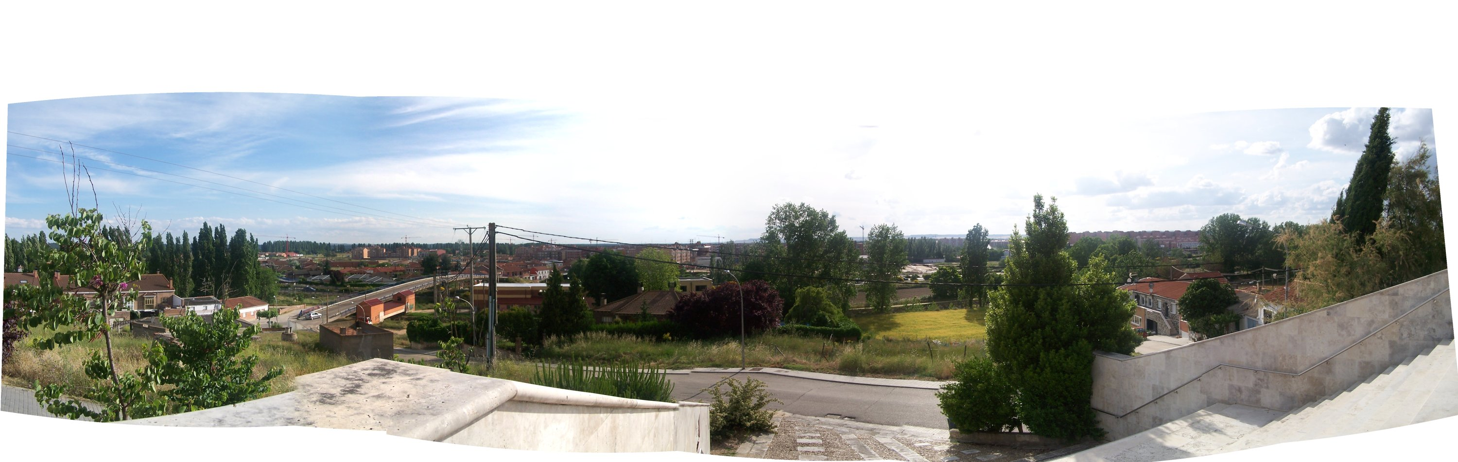 Laguna de Duero desde la ermita